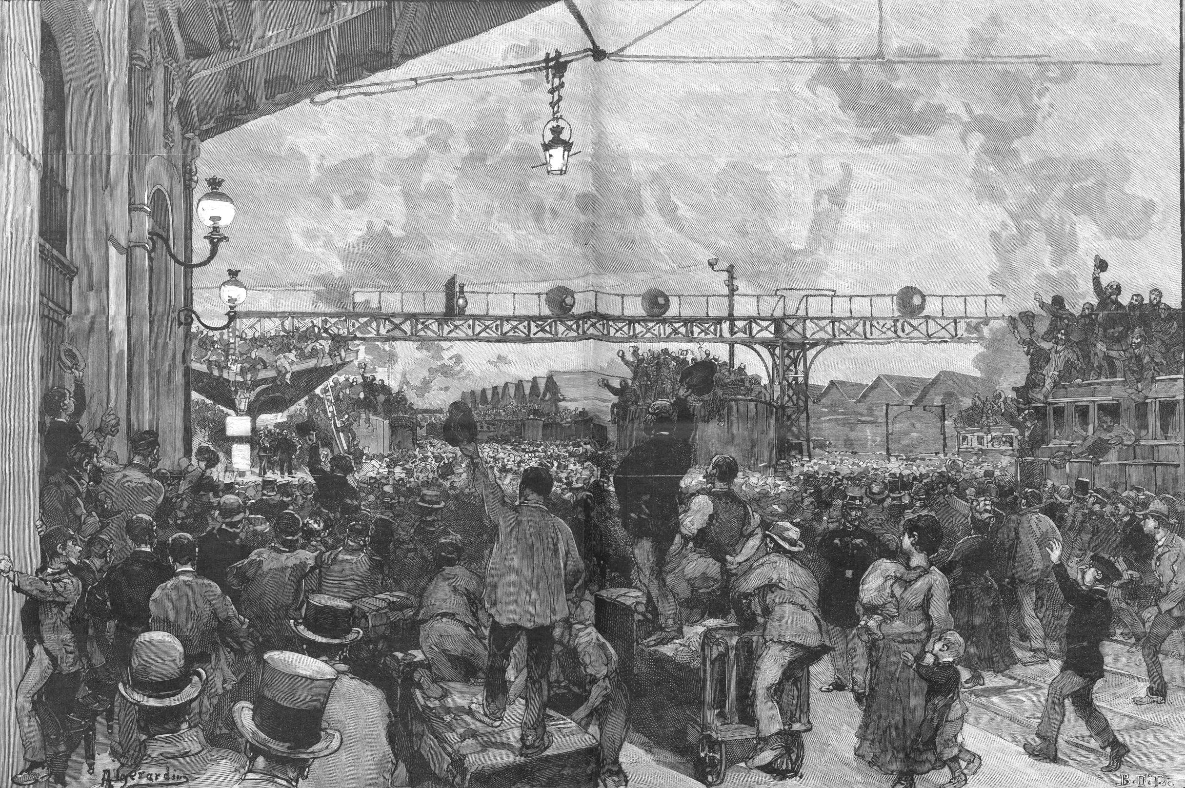 "Paris. Le départ du général Boulanger. A la gare de Lyon : envahissement des quais et des voies par une foule acclamant le général. (Dessin de M. Gérardin. Croquis de M. E. Grenier)".